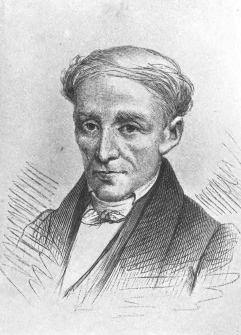 Wilhelm Hey. In: Der Sänger von Wandersmann und Lerche: Superintendent D. Wilhelm Hey : ein Lebensbild. Paul Stein (Hrsg.), Berlin: Zillessen, 1904